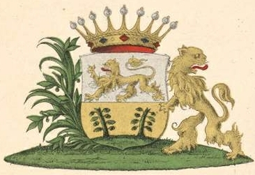 Stackelbergi suguvõsa krahvivapp